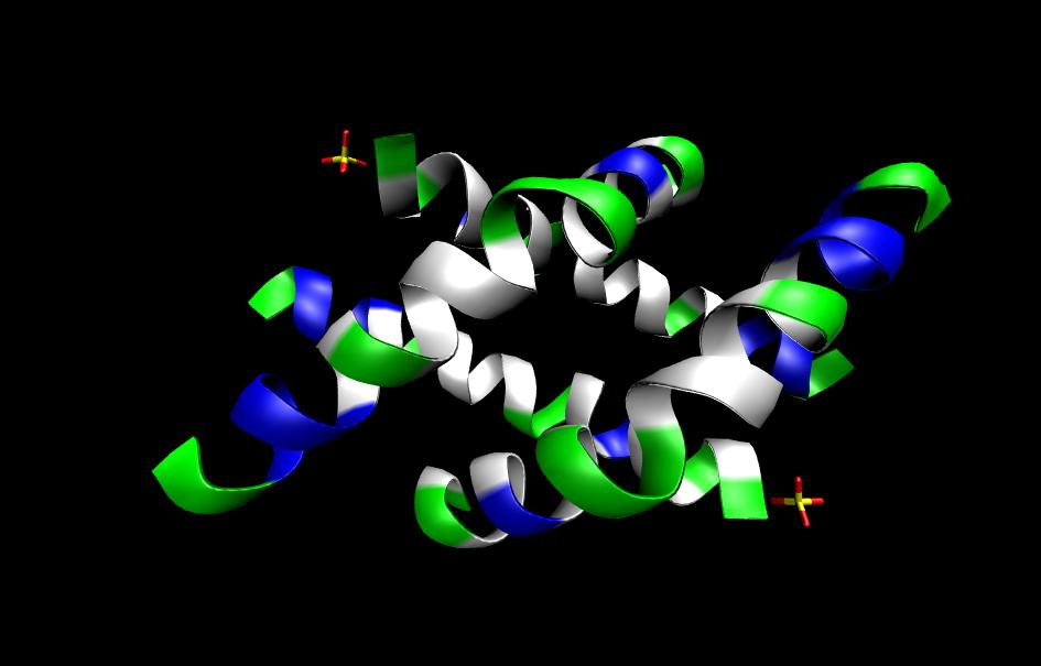 Struktur von Mellitin. Selbst mit VMD/povray erstellt